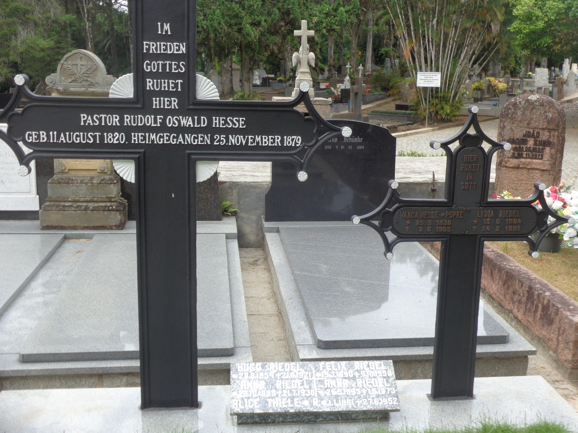 Pastor Rudolf Oswaldo Hesse no Cemitério Luterano Blumenau Centro